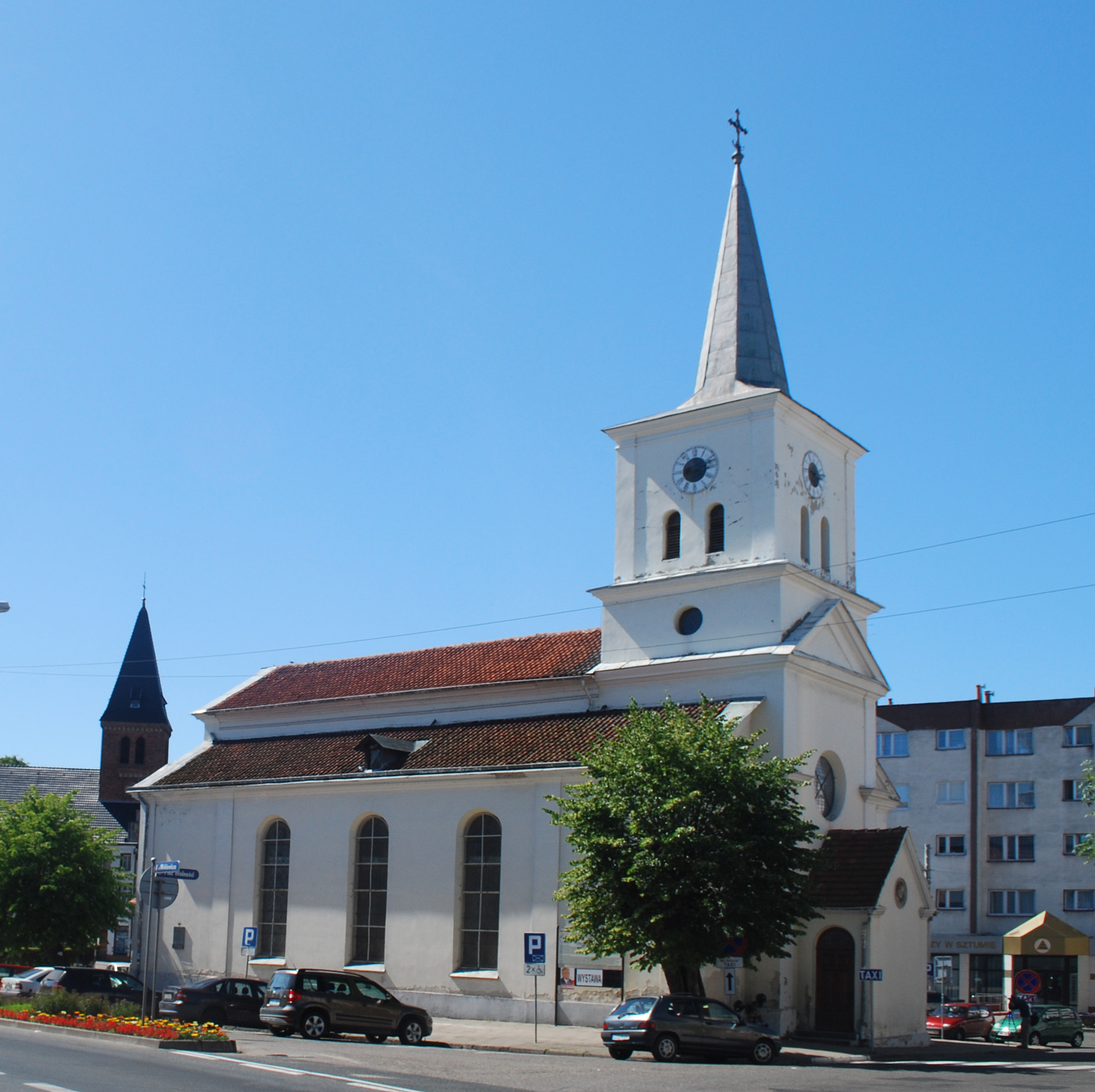 Sztum - dawny kościół ewangelicki, obecnie rzymskokatolicki filialny p.w. Matki Boskiej Wspomożenia Wiernych, 1816-1818 You can see all photographs in category Wikiekspedycja 2010. The making of this document was supported by Wikimedia Polska.